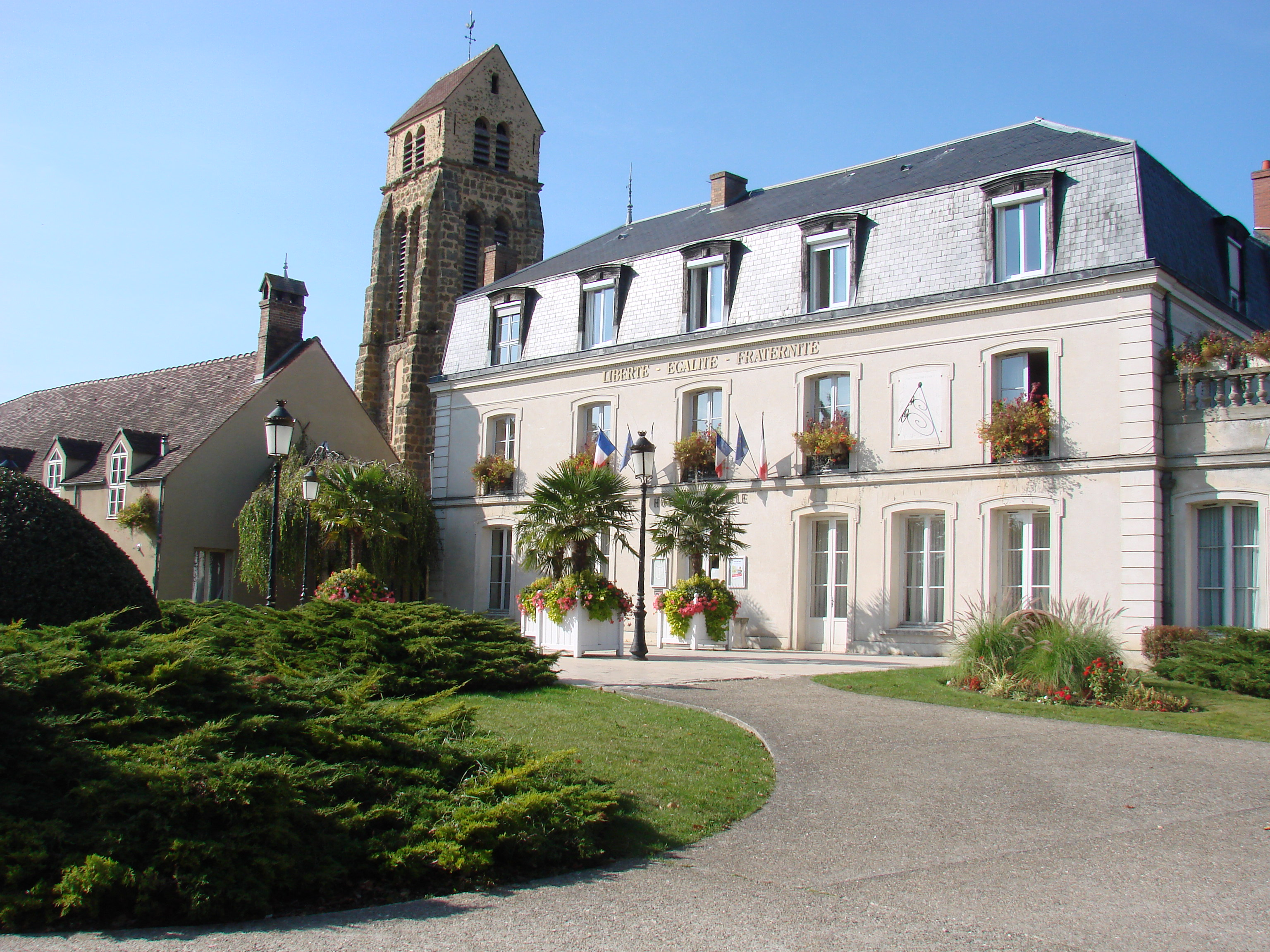 La Mairie et l'église de Saint-Germain-lès-Arpajon (Essonne, France)